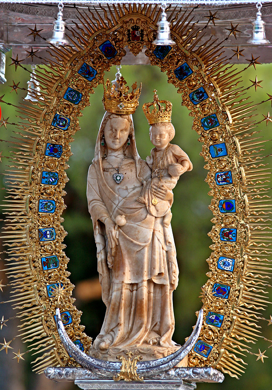 Ntra. Señora de los Milagros, patrona de Palos de la Frontera